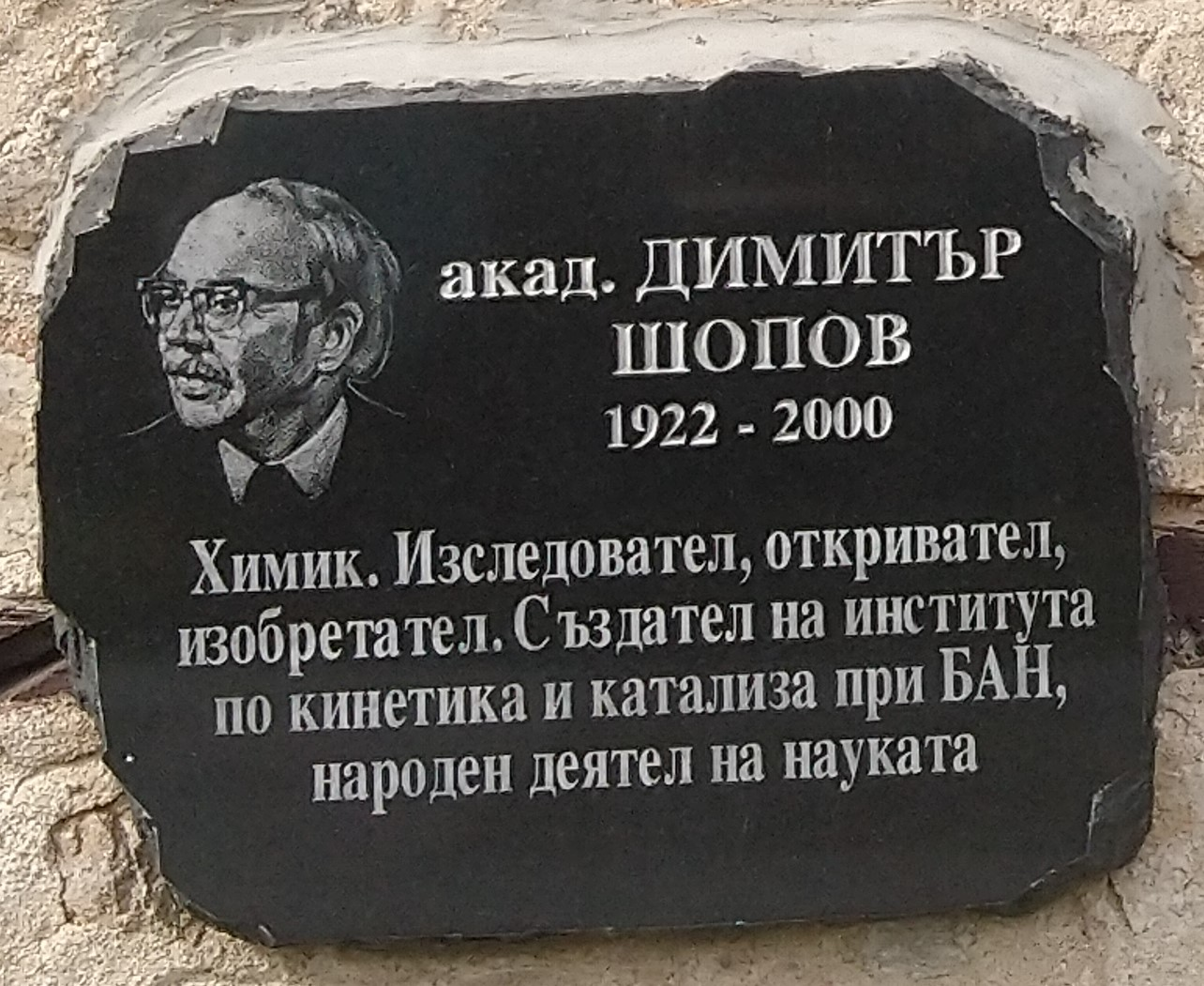 акад. Димитър Шопов (1922-2000) - плоча в Исторически музей Панагюрище - Надпис: Химик. Изследовател, откривател, изобретател. Създател на Института по кинетика и катализа при БАН, народен деятел на науката